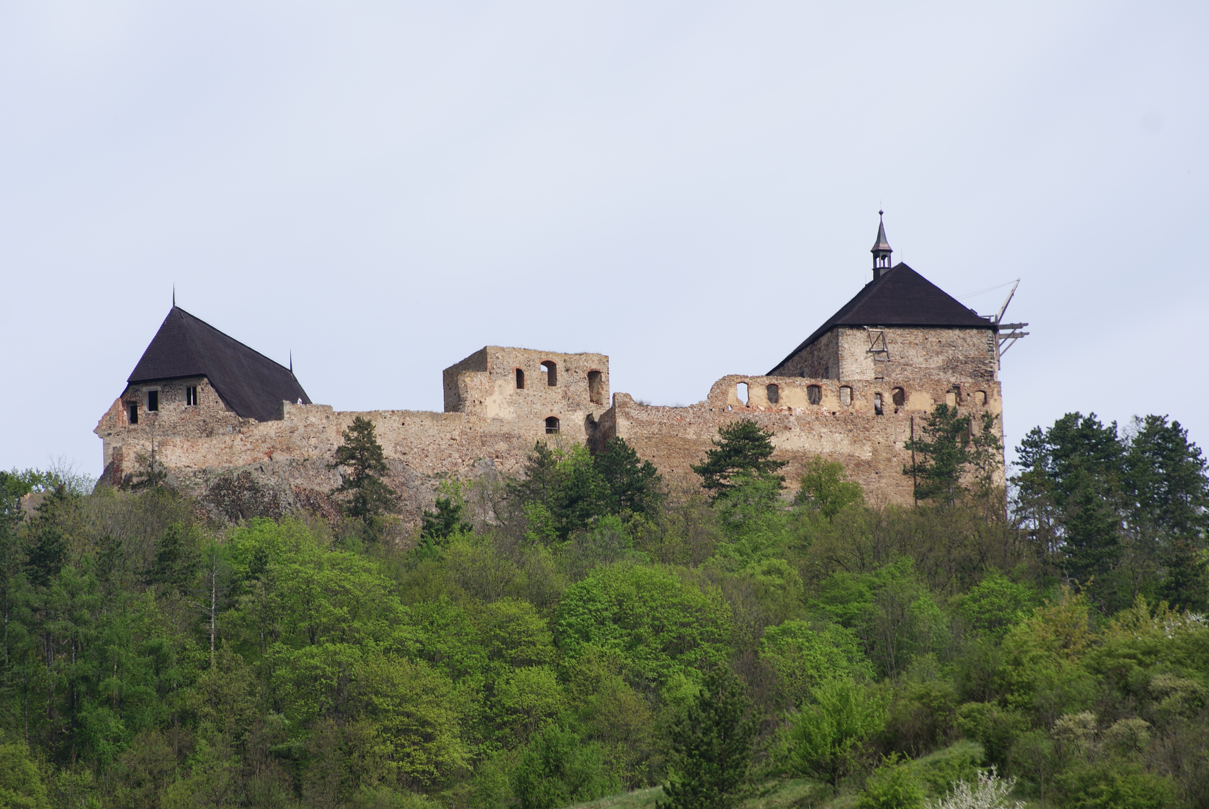 Hrad Točník (Točník), Točník 10